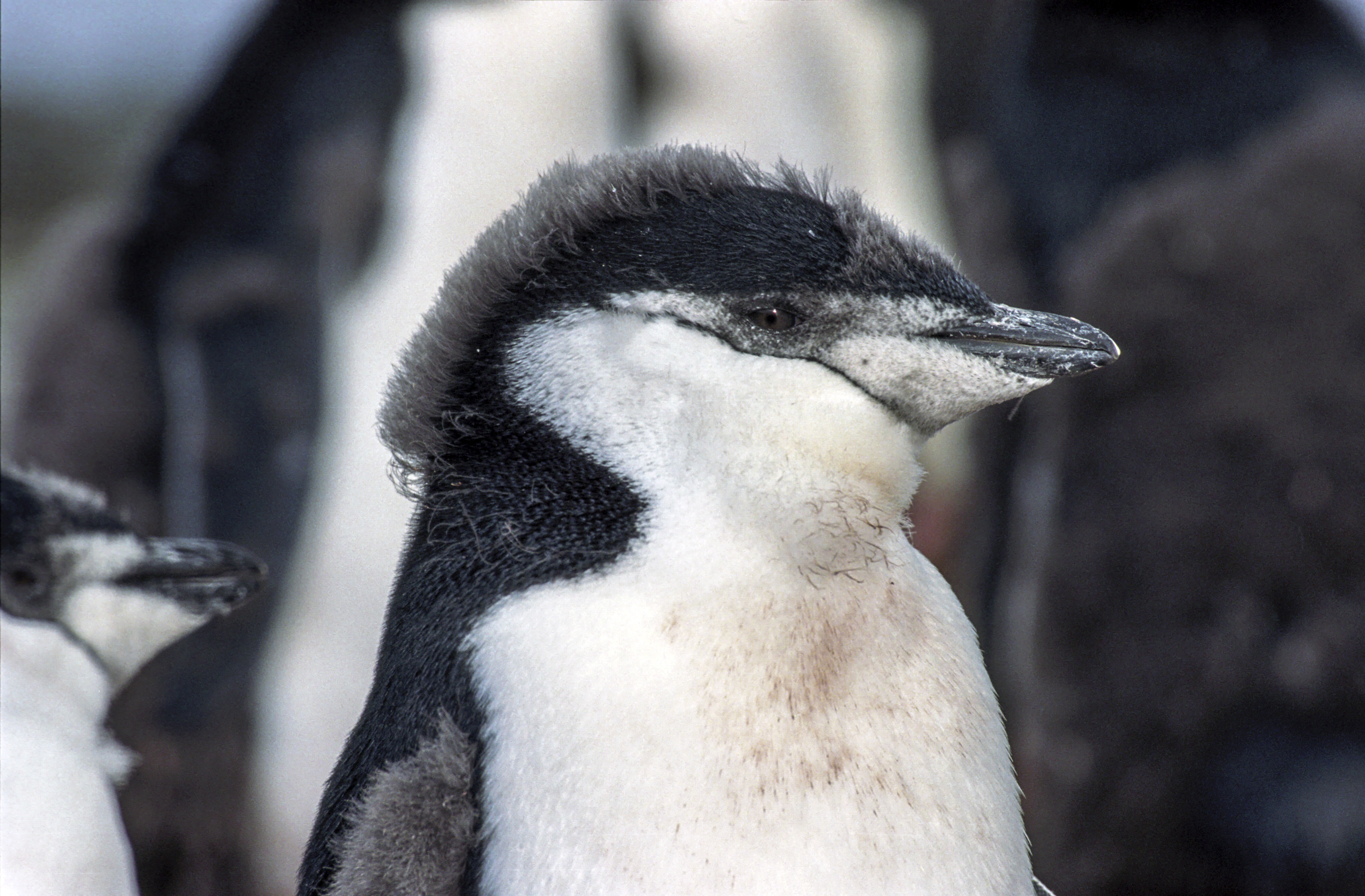 Antarctic